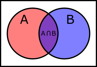 Venna diagramma, kas attēlo kopu šķēlumu